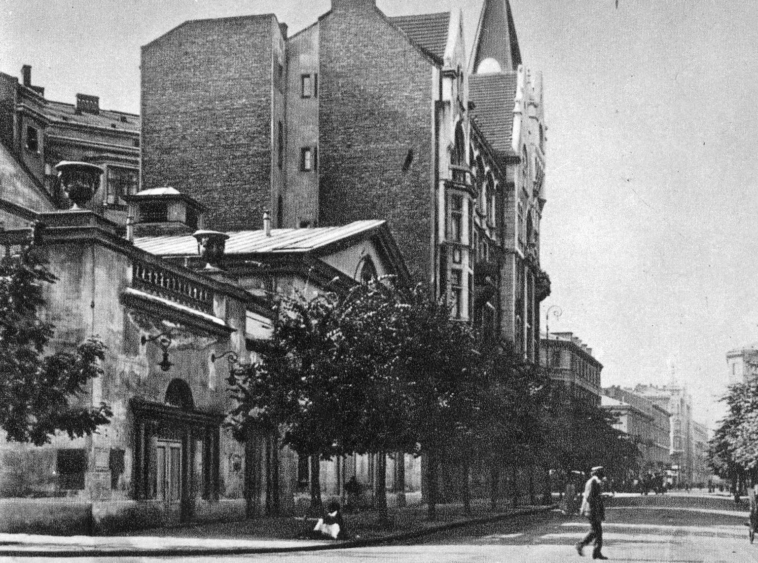 Budynek teatru ul. Jasna 3 róg Sienkiewicza 7 w Warszawie